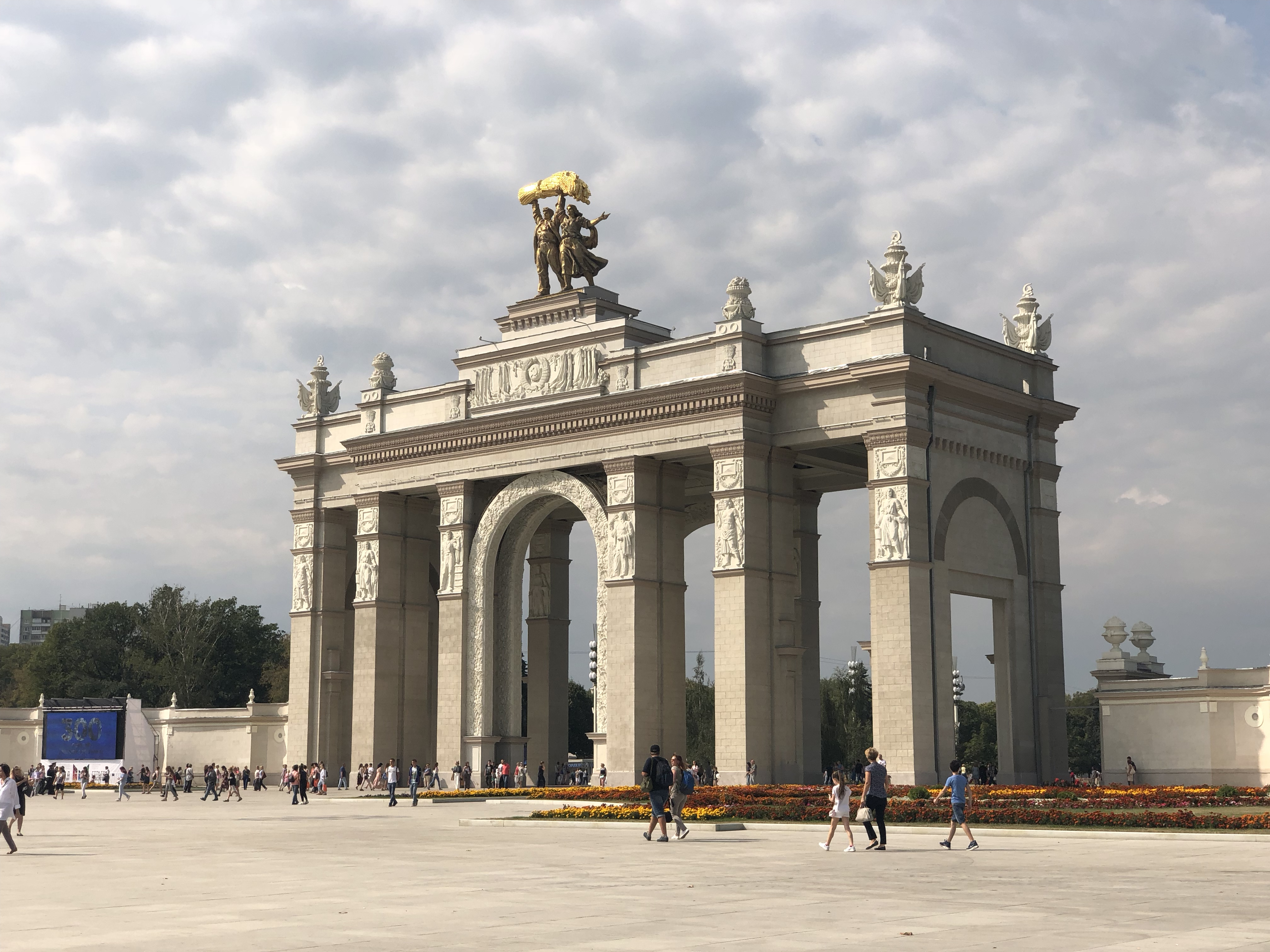 Выставка достижений народного хозяйства: Останкинский, Северо-Восточный округ, Москва